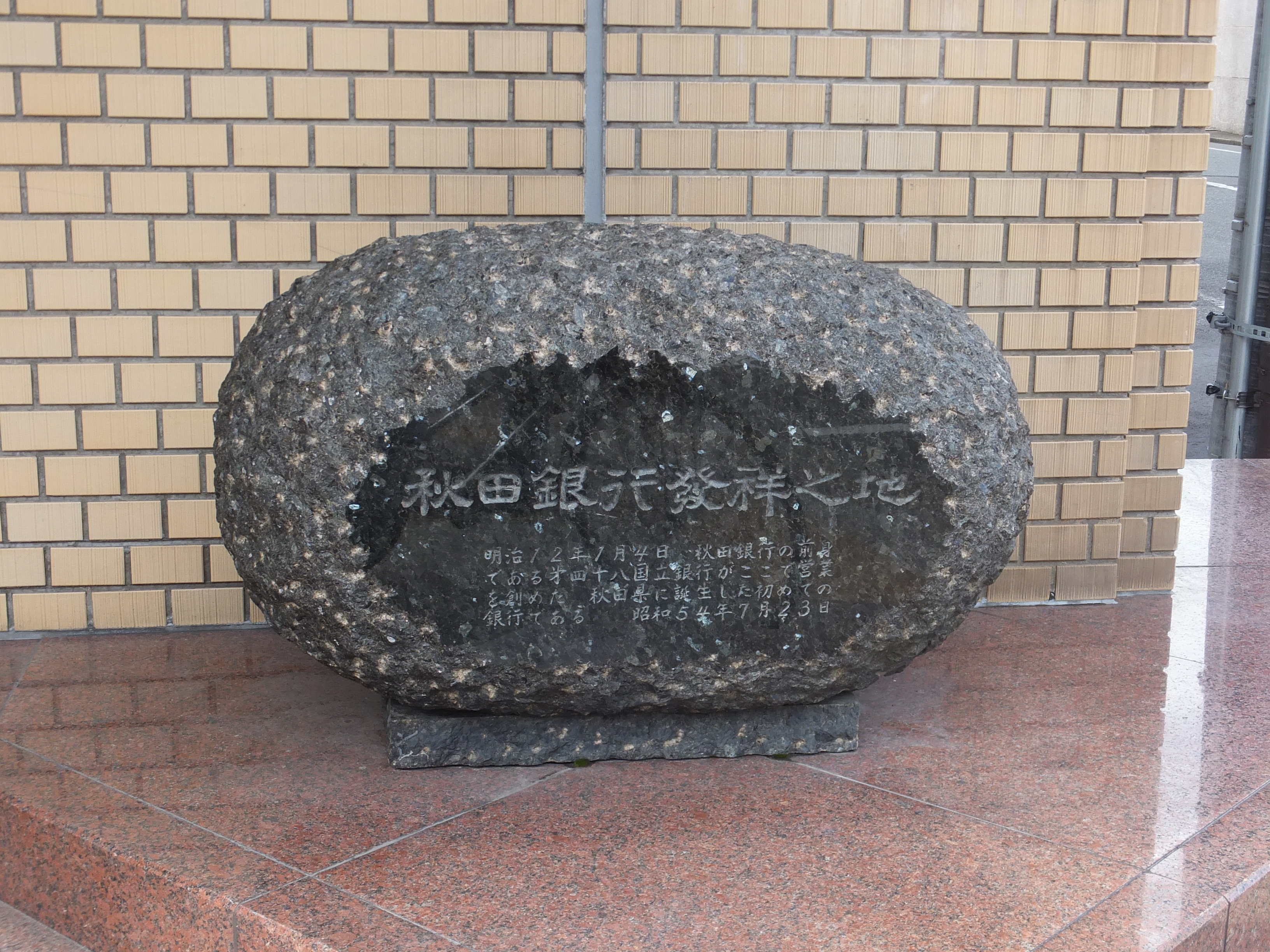 秋田銀行大町支店入口にある秋田銀行発祥の地碑